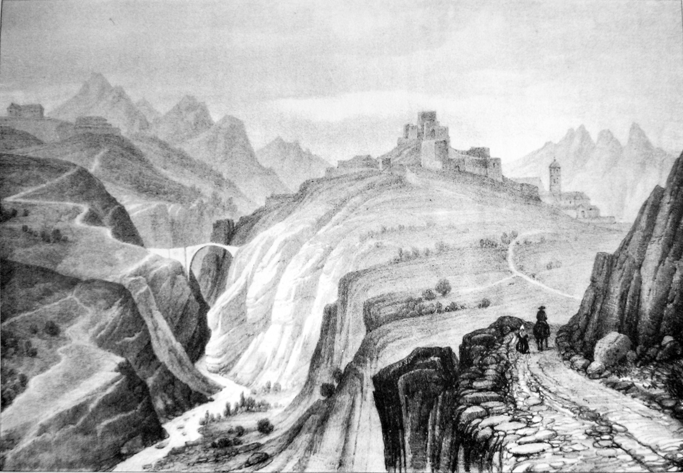 Briançon (Hautes-Alpes) ATTENTION ! Ce facsimilé est réalisé en applicant des alterations avec un logiciel graphique à une copie numérique, obtenue à partir d'une prise de photo faite par un non-professionnel. Elle pourrait ne pas être parfaitement réussie.